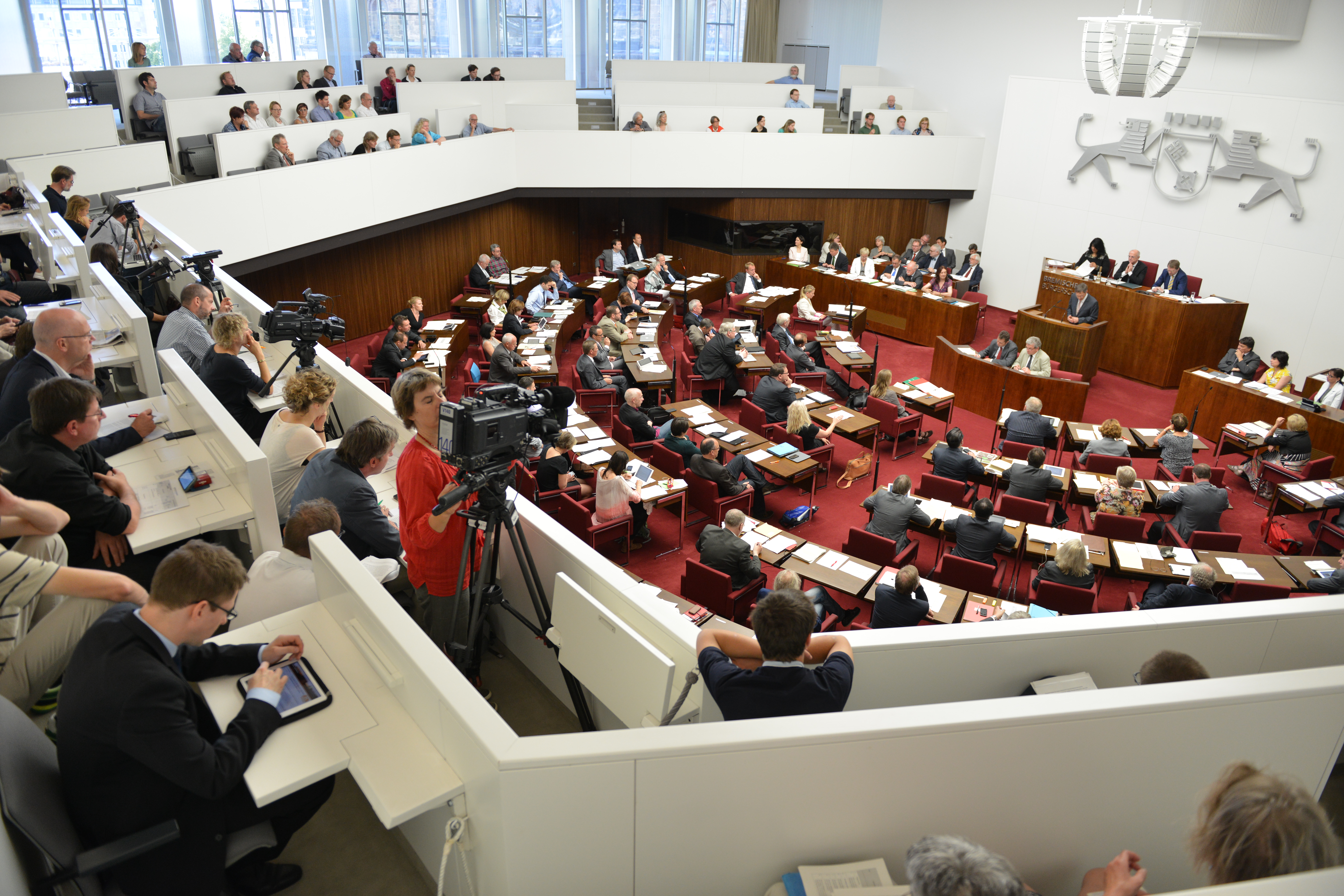 Sitzung der Bremischen Bürgerschaft (Landtag) am 22. Juli 2015